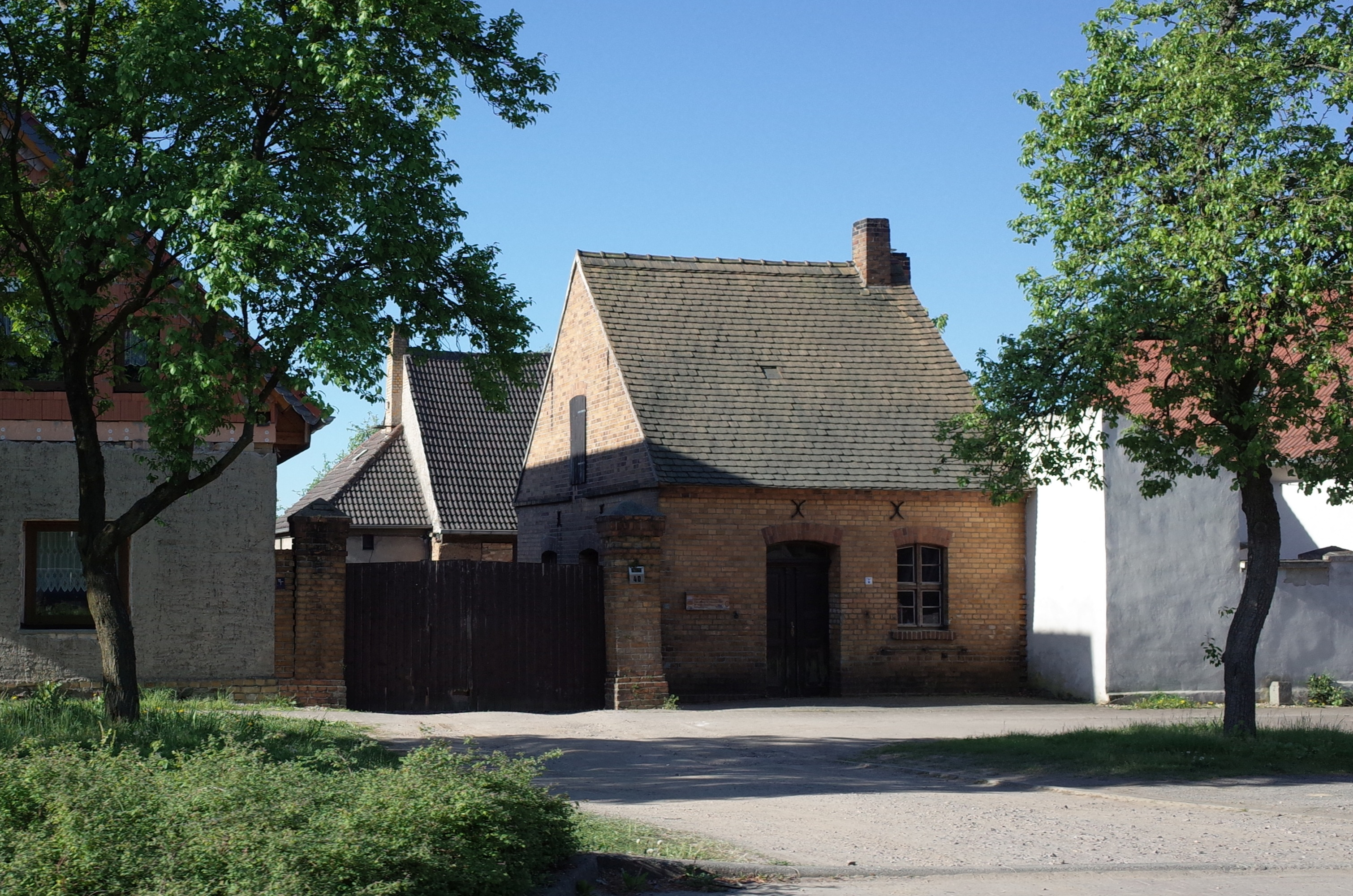 Bad Schmiedeberg, Ortsteil Söllichau. Die ehemalige Dorfschmiede wird heute als Museumsschmiede genutzt. [1]